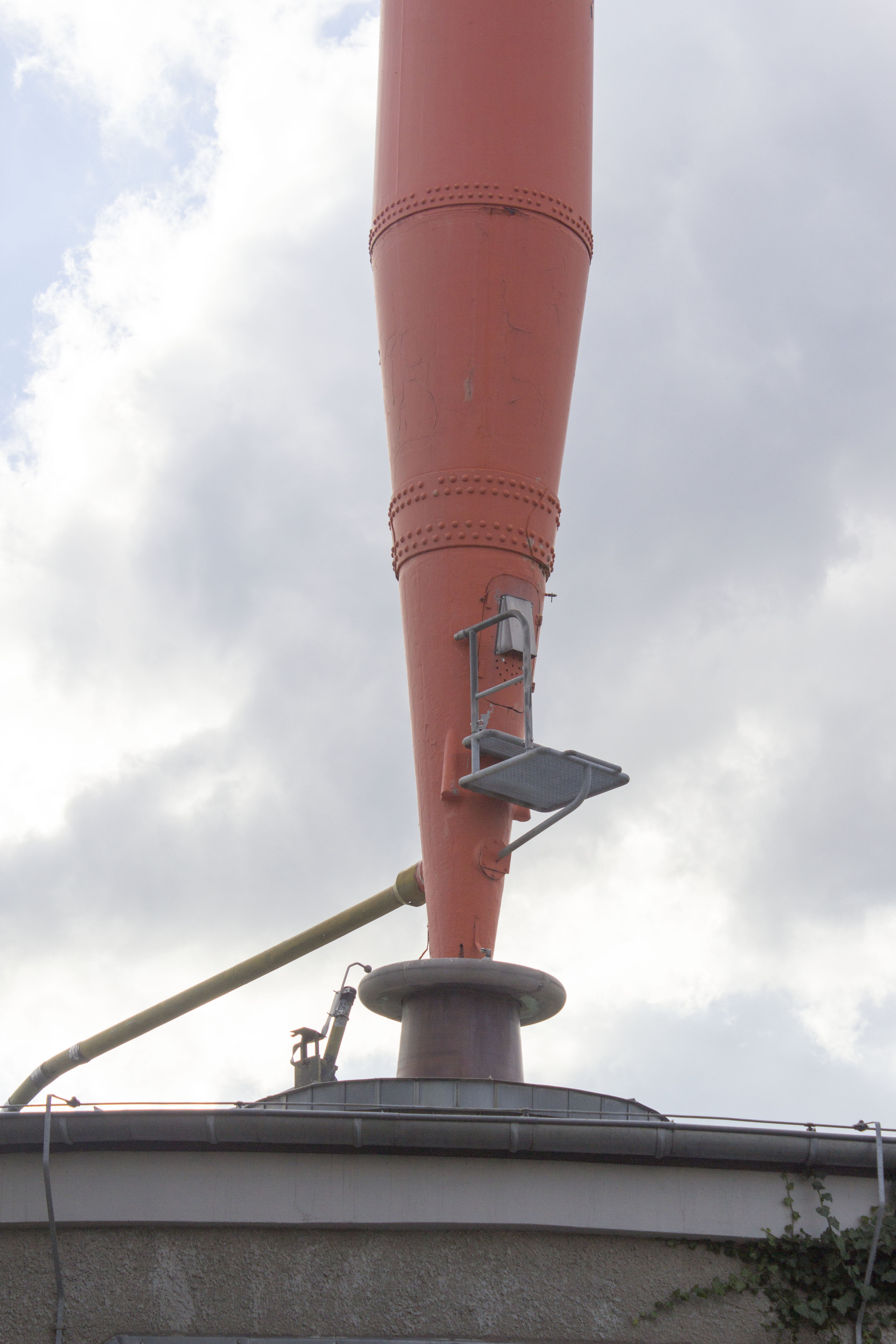 Der Sockel mit Einstiegsluke des Mitellwellensenders in Wilsdruff